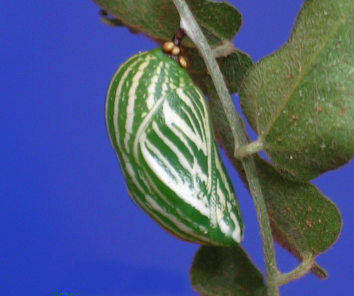 Polyura athamas pupa